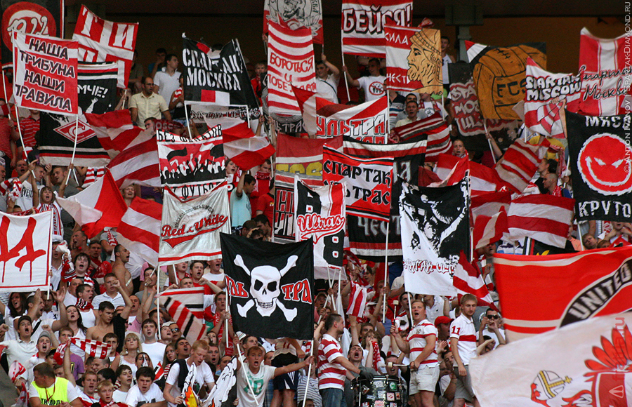 Двуручники на фанатском секторе красно-белых. 2011 год